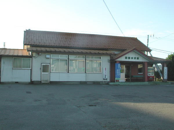 Uzen Mizusawa Station, on Uetsu Main Line, Tsuruoka, Yamagata, Japan